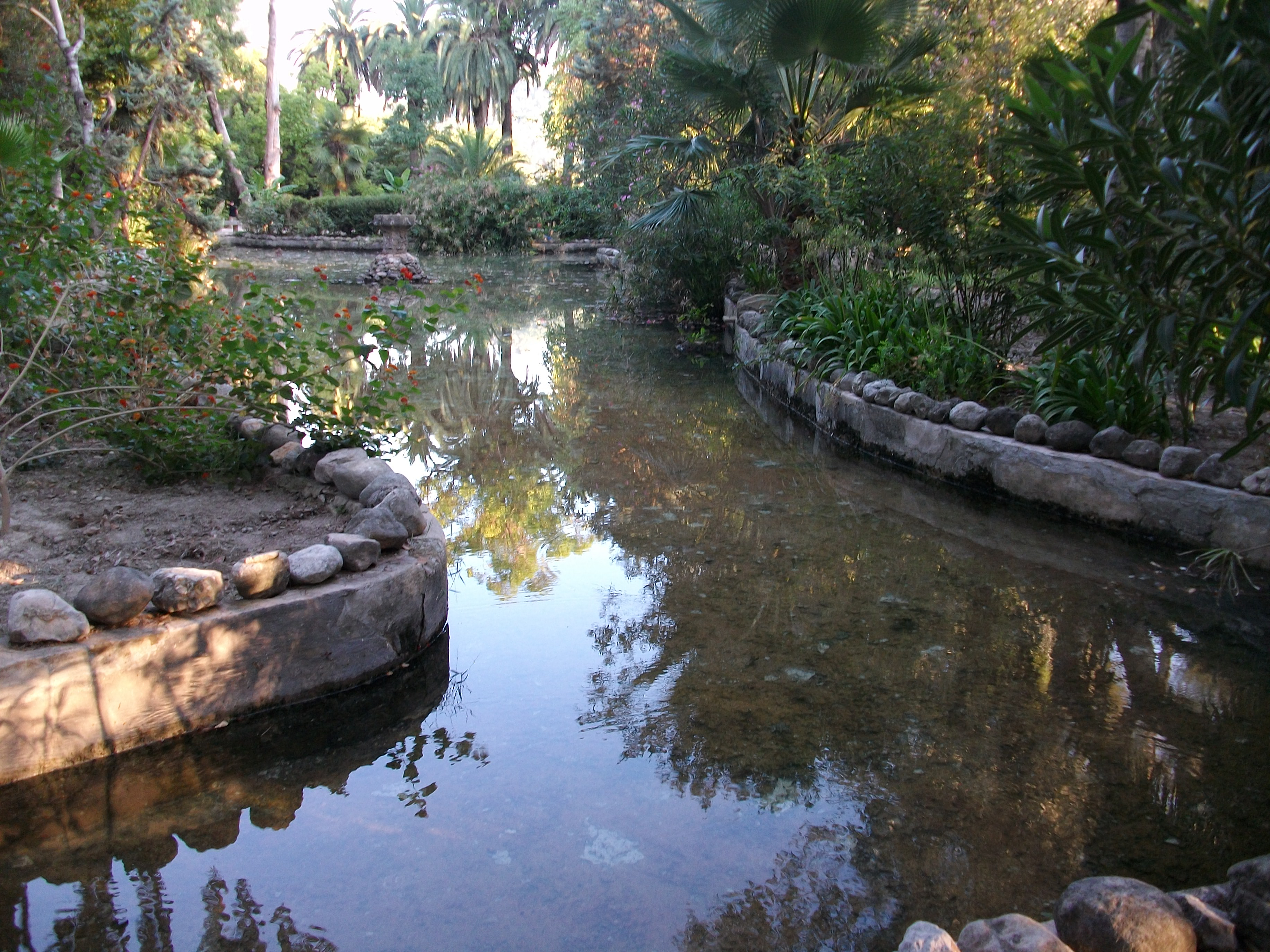 Jardí romàntic dels Trènor de Sant Jeroni de Cotalba.